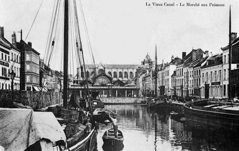 Vue sur le port et le marché aux poissons vers 1890